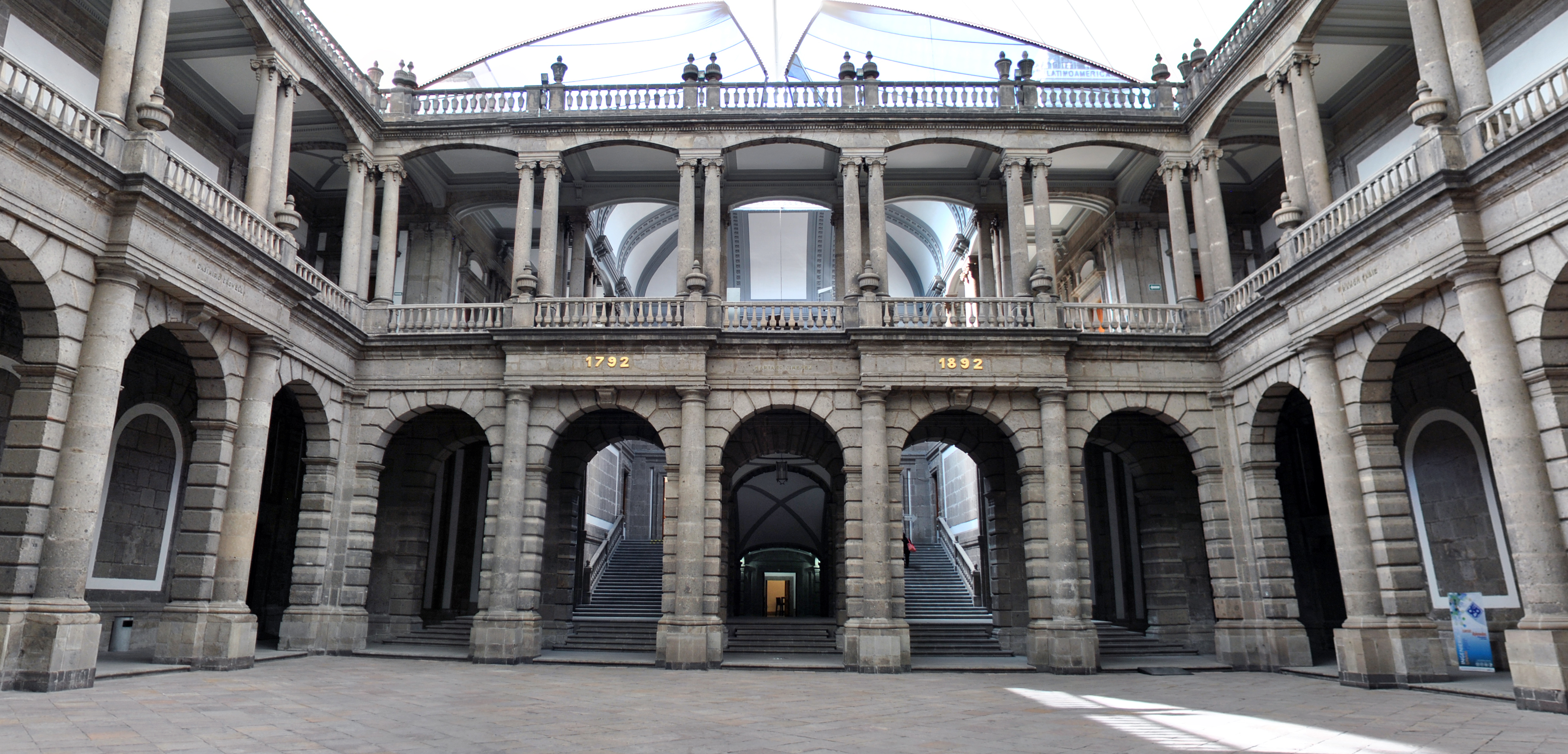 Panorámica del Patio principal del Palacio de Minería — Mexico, D. F.